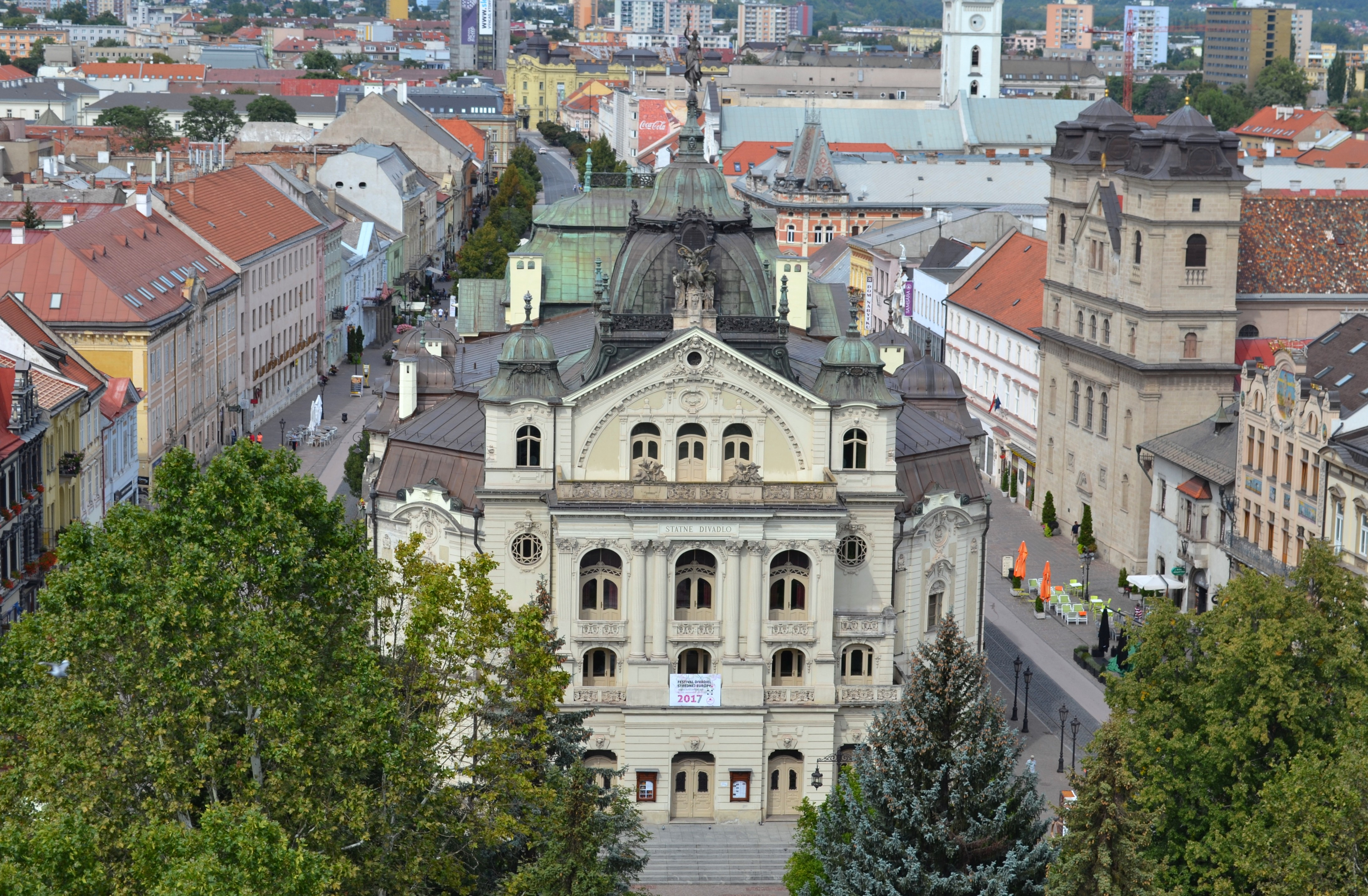 Štátne divadlo v Košiciach